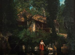 Beniamino De Francesco, Moulin dans un bois avec une jeune fille, huile sur toile, collection particulière.